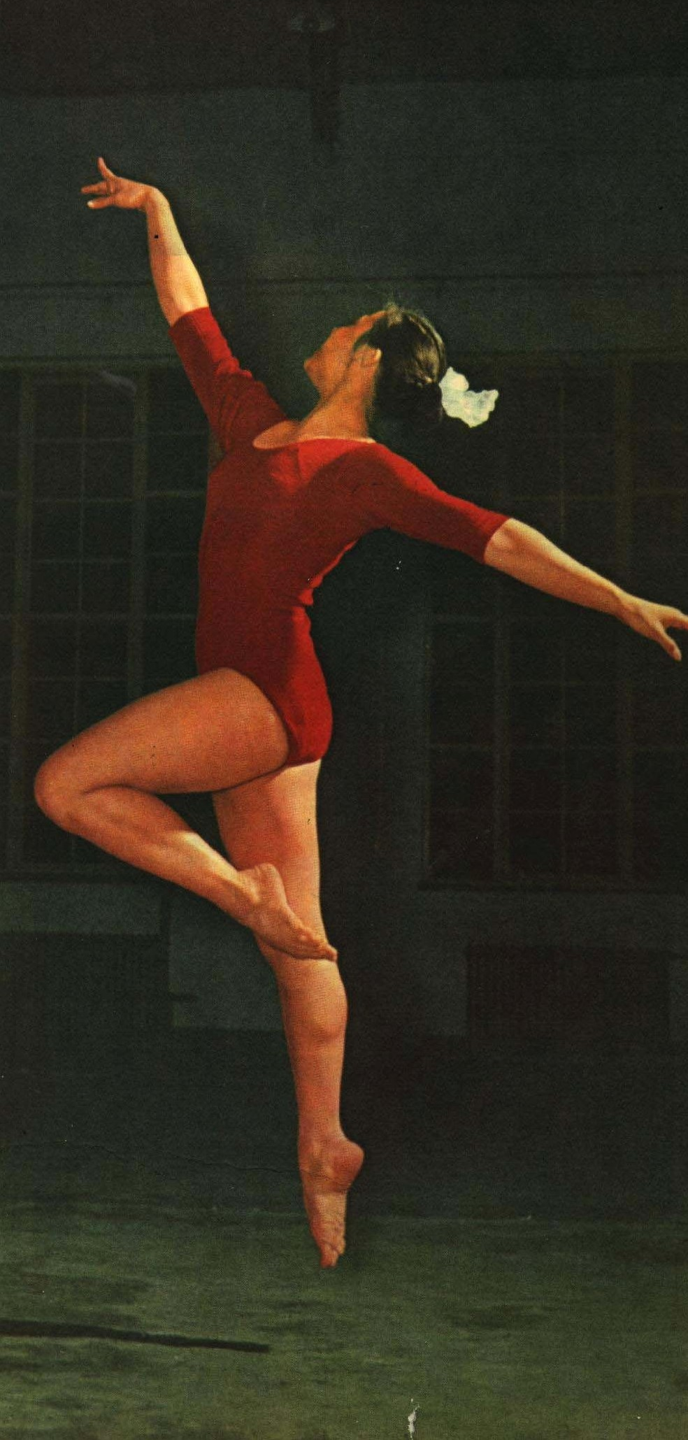 1962-04 1962年 体操运动员佘淑勤 自由体操